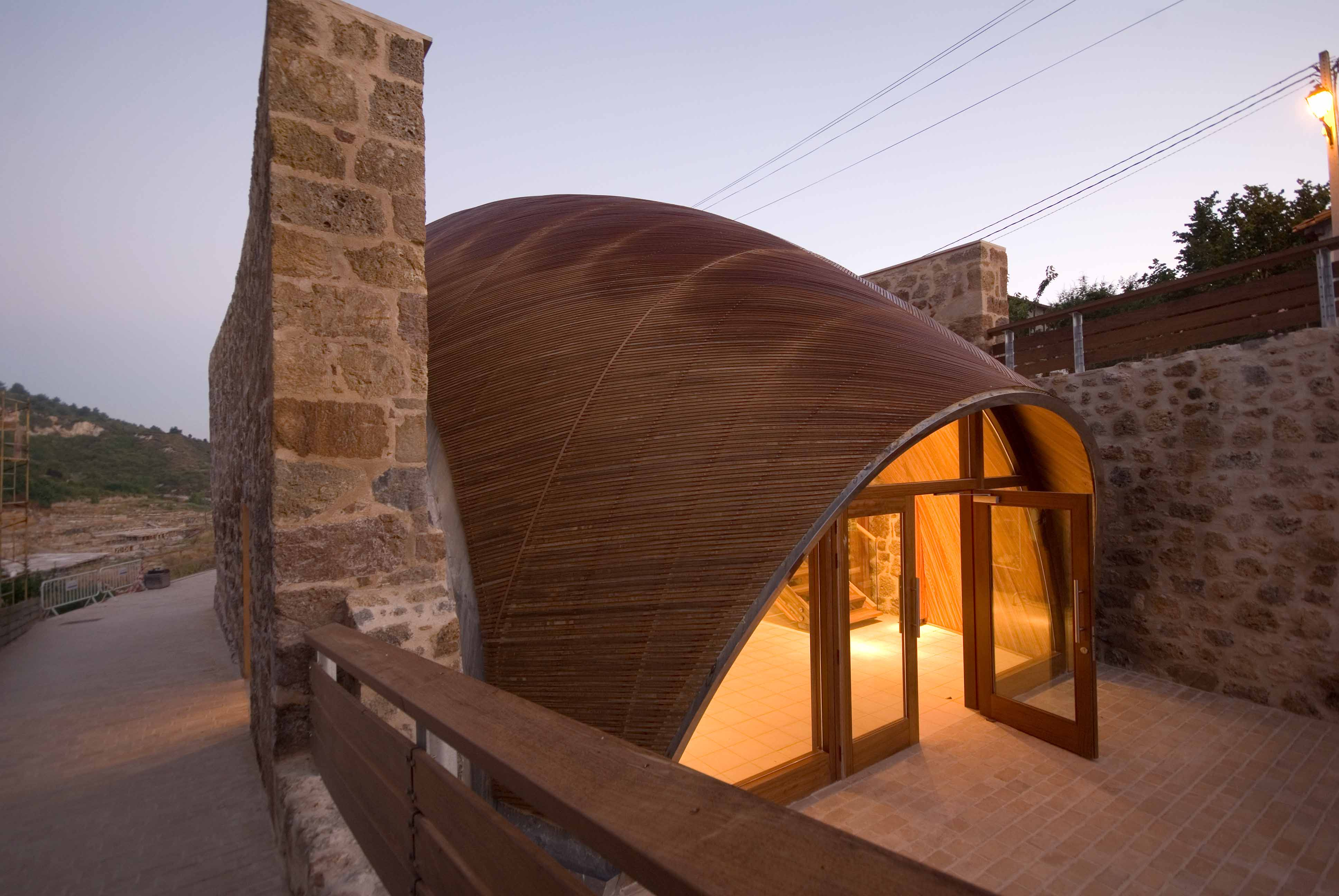 Almacén de sal construido en época de Felipe II. Actualmente es el centro de acogida a los visitantes y la tienda de sal